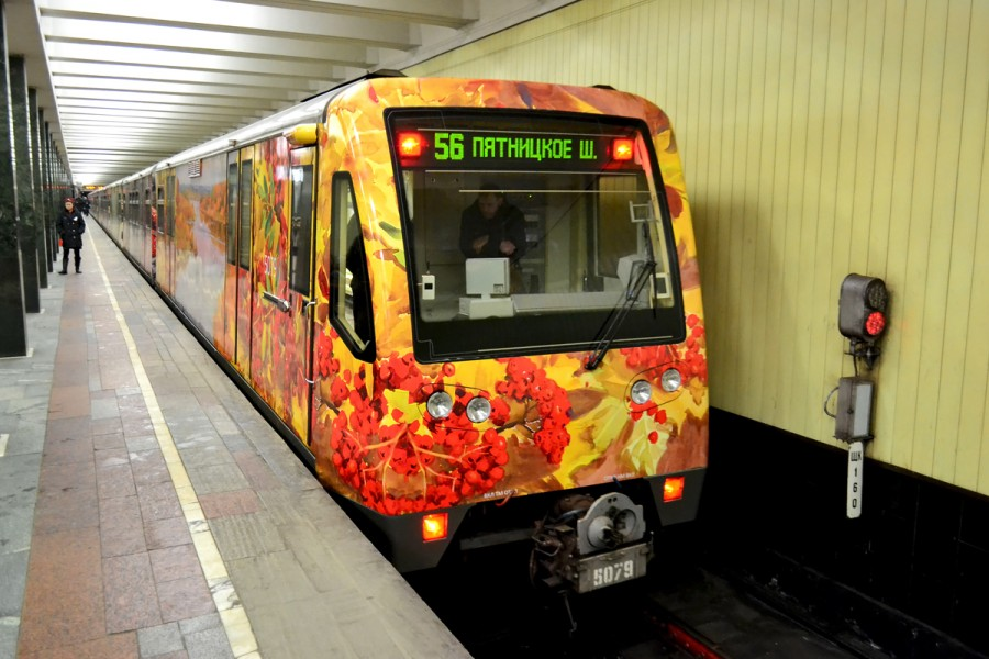 Электропоезд 81-740/741 Акварель с цветочным оформлением со стороны вагона 5079 в жёлтом цвете